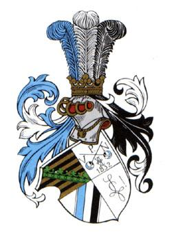 Studentenwappen des Corps Saxonia Bonn